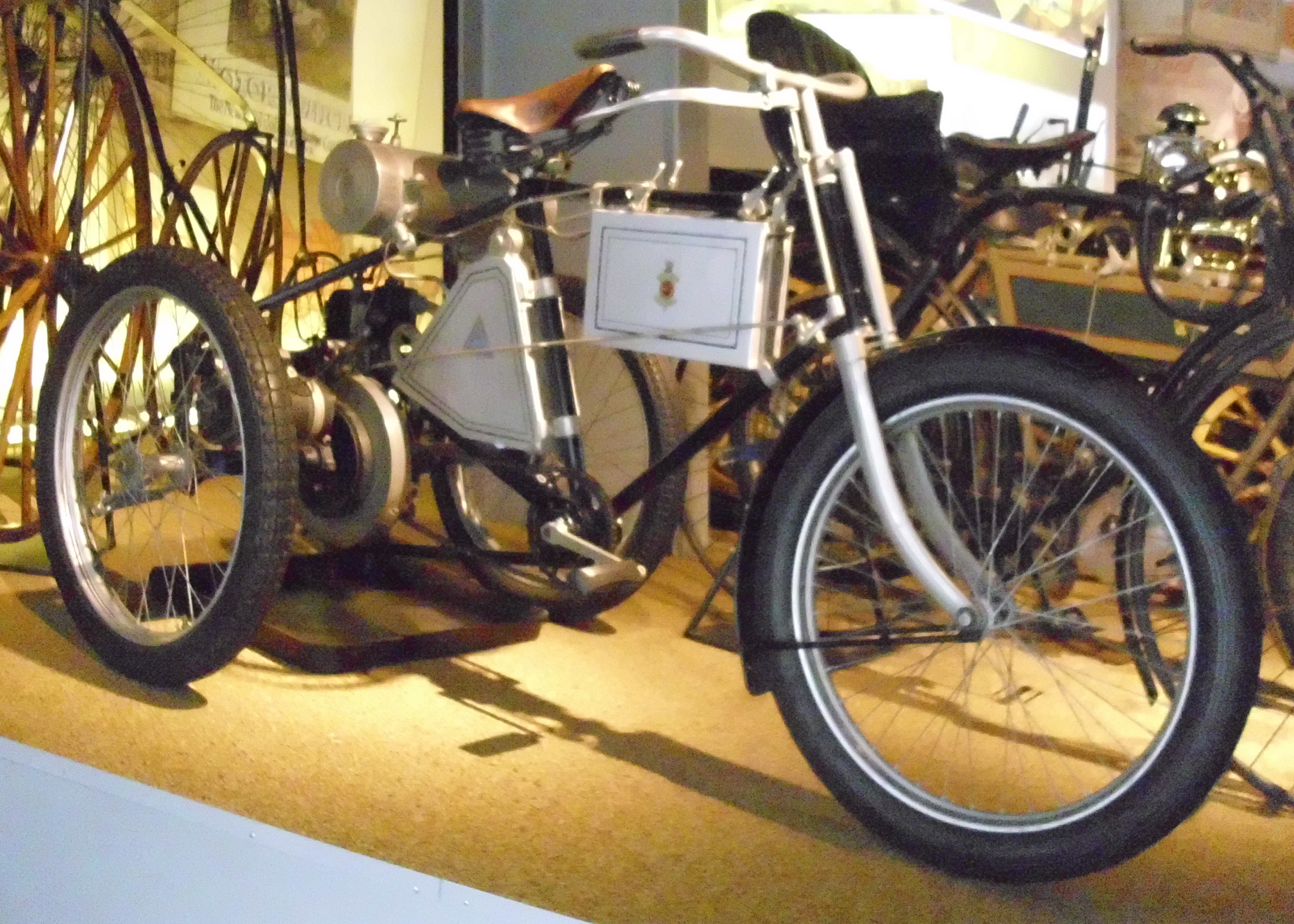 Ariel Tricycle 1898–1899